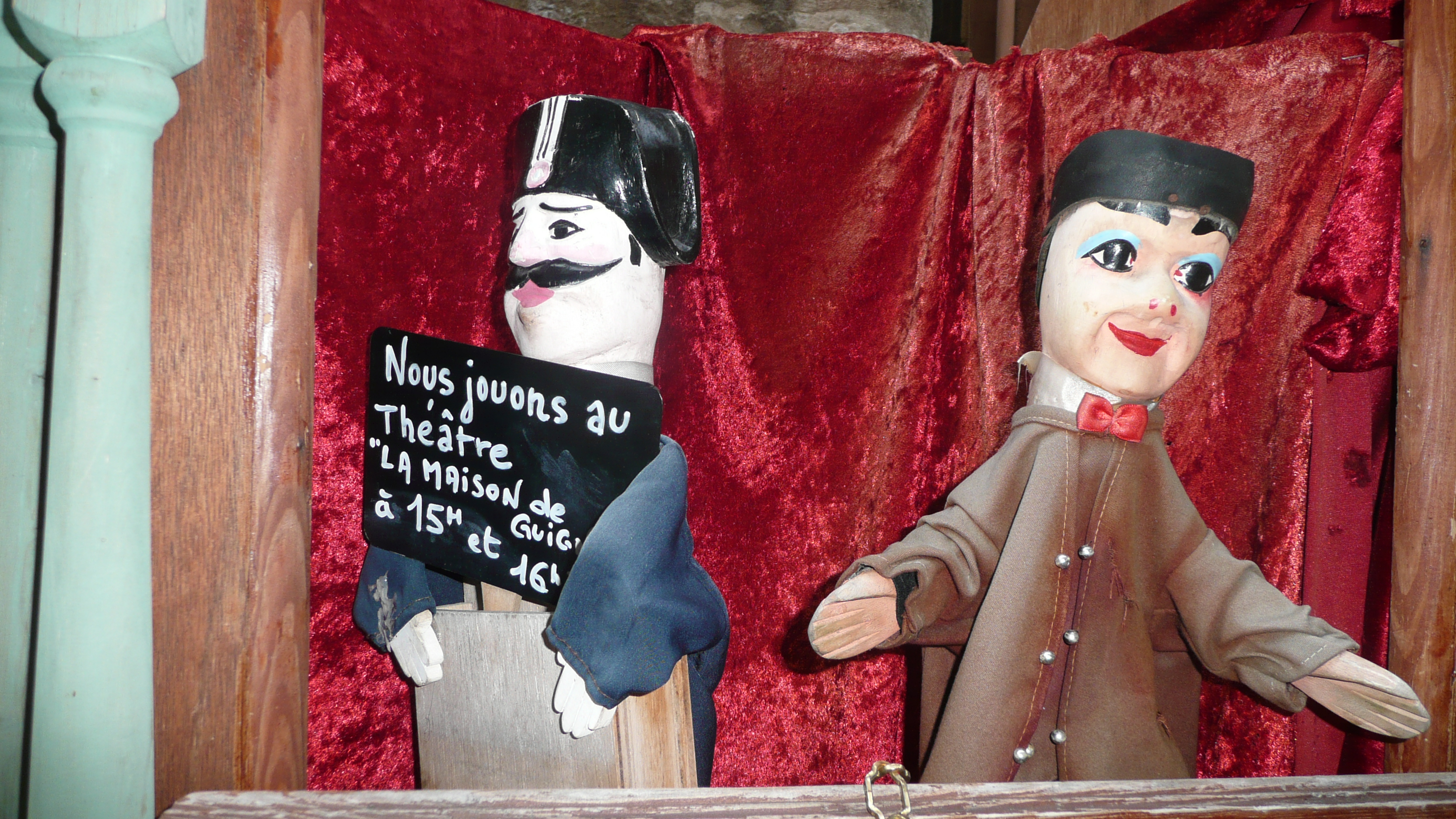 Guignol in Lyon